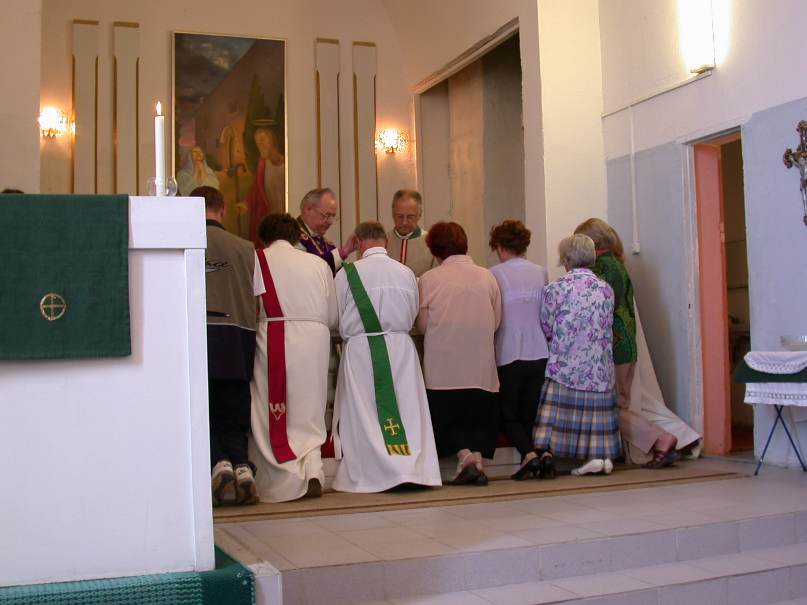 Ehtoollinen Sortavalan kirkossa.